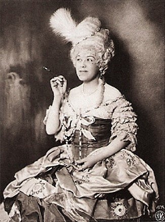 Ida Wüst (1884-1958)